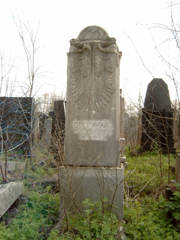 Tull Ödön (Székesfehérvár, 1870. május 9. – Budapest, 1911. szeptember 15.) festő és grafikus sírja Budapesten. Kozma utcai izraelita temető: 5-1-18.